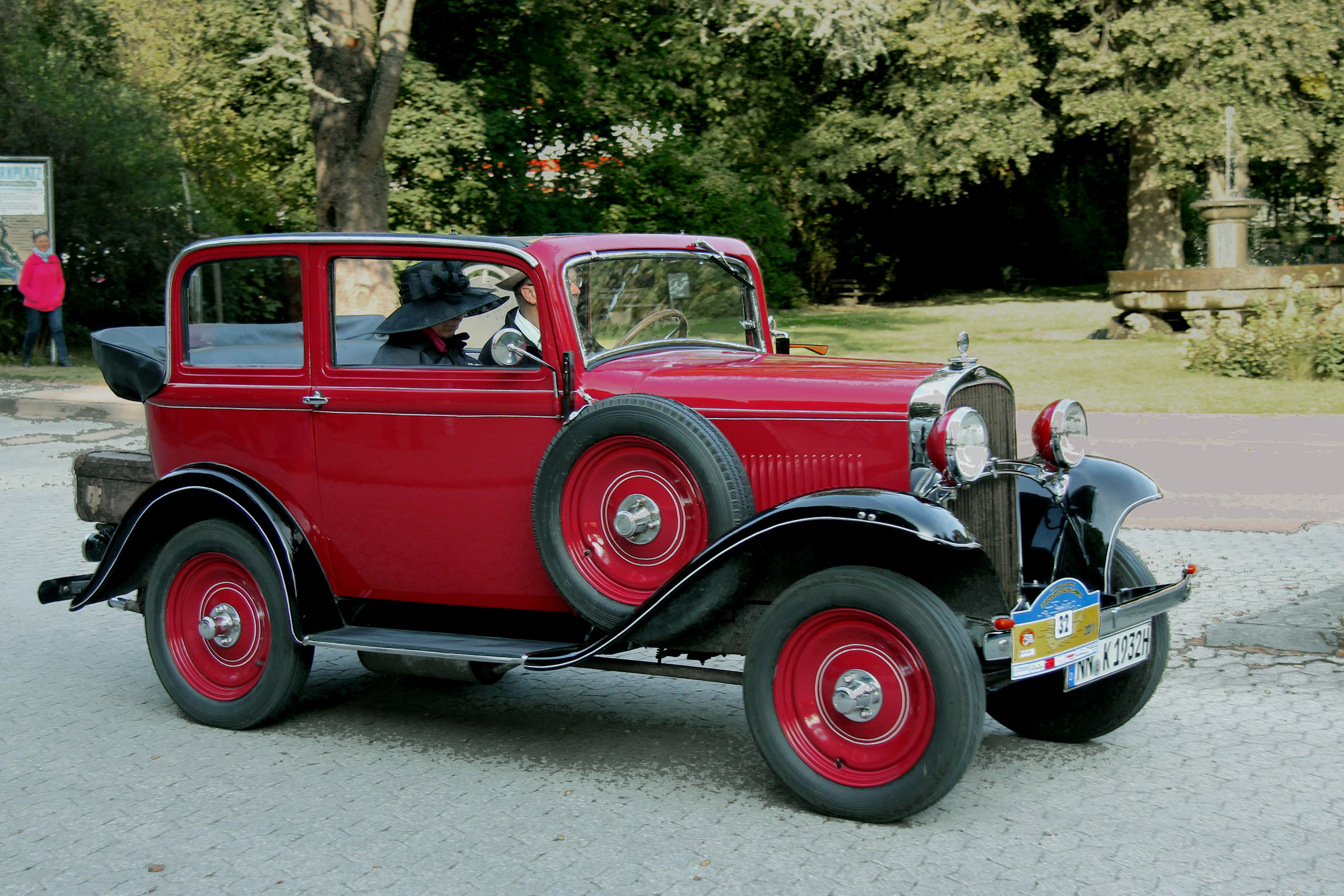 Opel 1,2 Liter, Baujahr 1932, bei der Moselschiefer-Classic